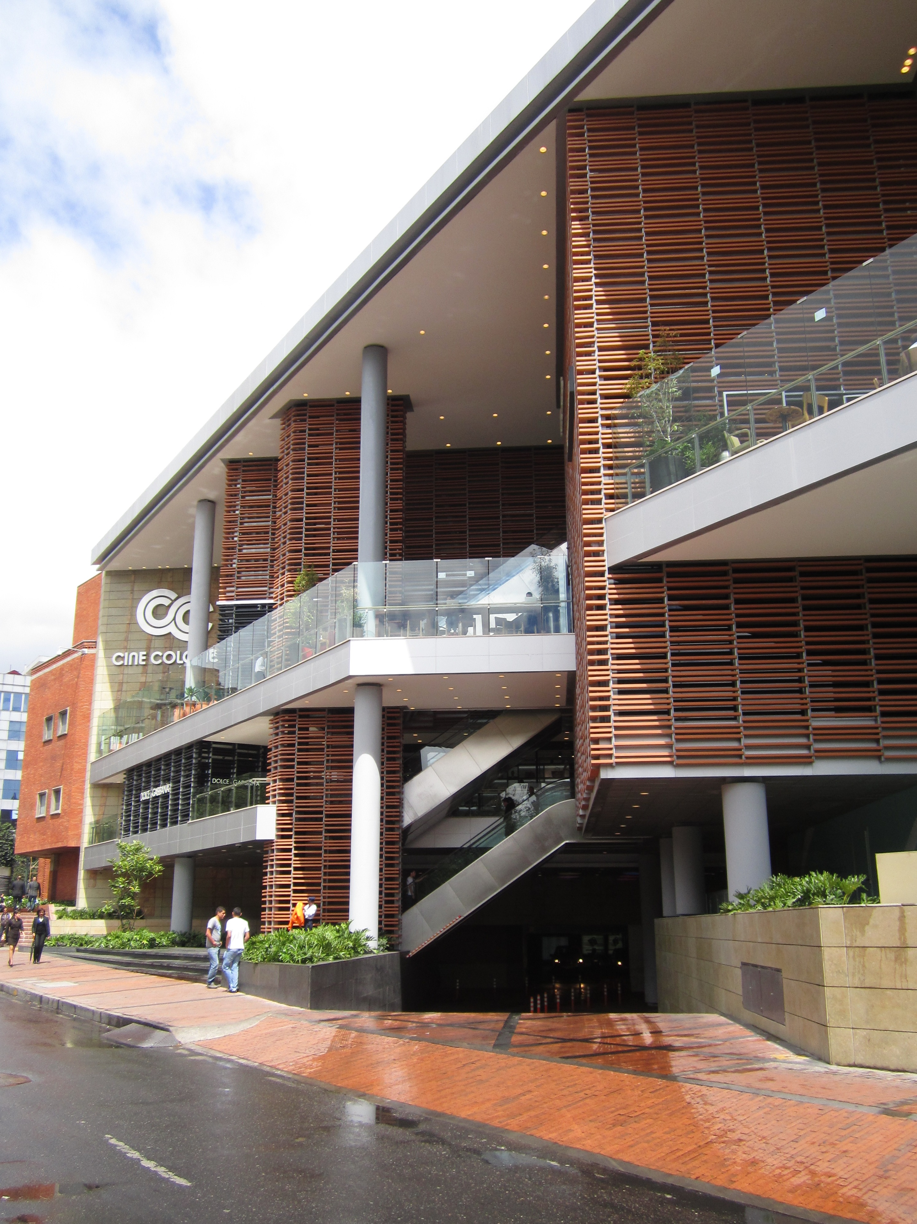 Centro Comercial Andino, entrada por la carrera 12 entre calles 82 y 83.